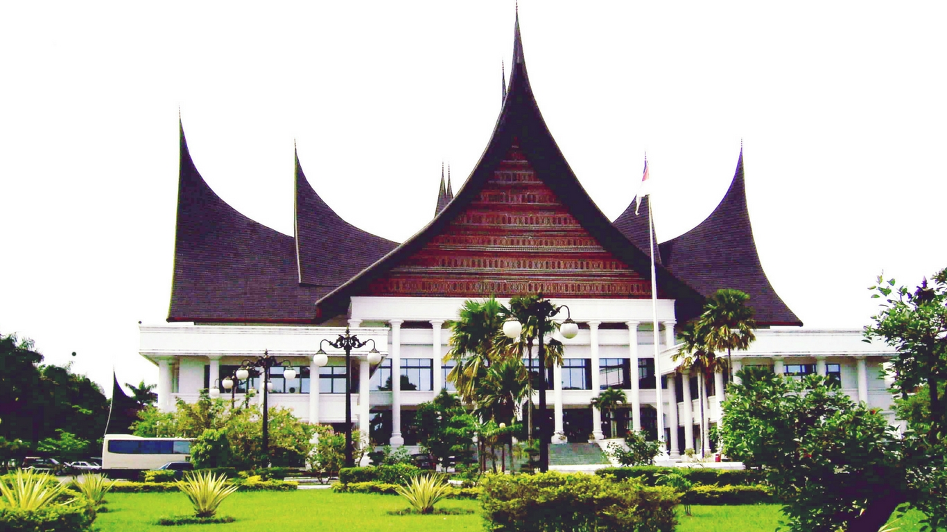 Gedung DPRD Sumbar